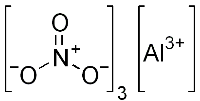 chemical structure of aluminium nitrate (aluminum nitrate)